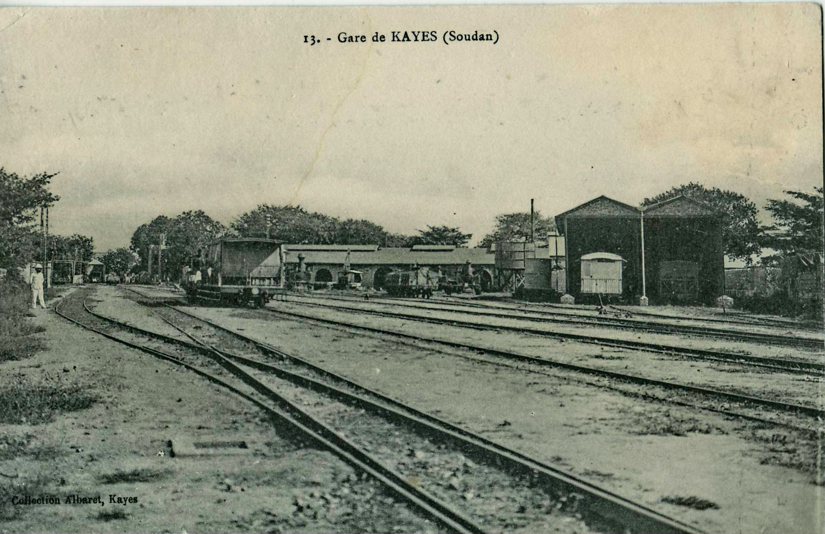 Carte postale ancienne éditée par Albaret à Kayes, n°13 : Gare de KAYES (ancien Soudan français).Gare sur le Chemin de fer du Dakar-Niger. Kayes est aujourd'hui une capitale régionale du Mali